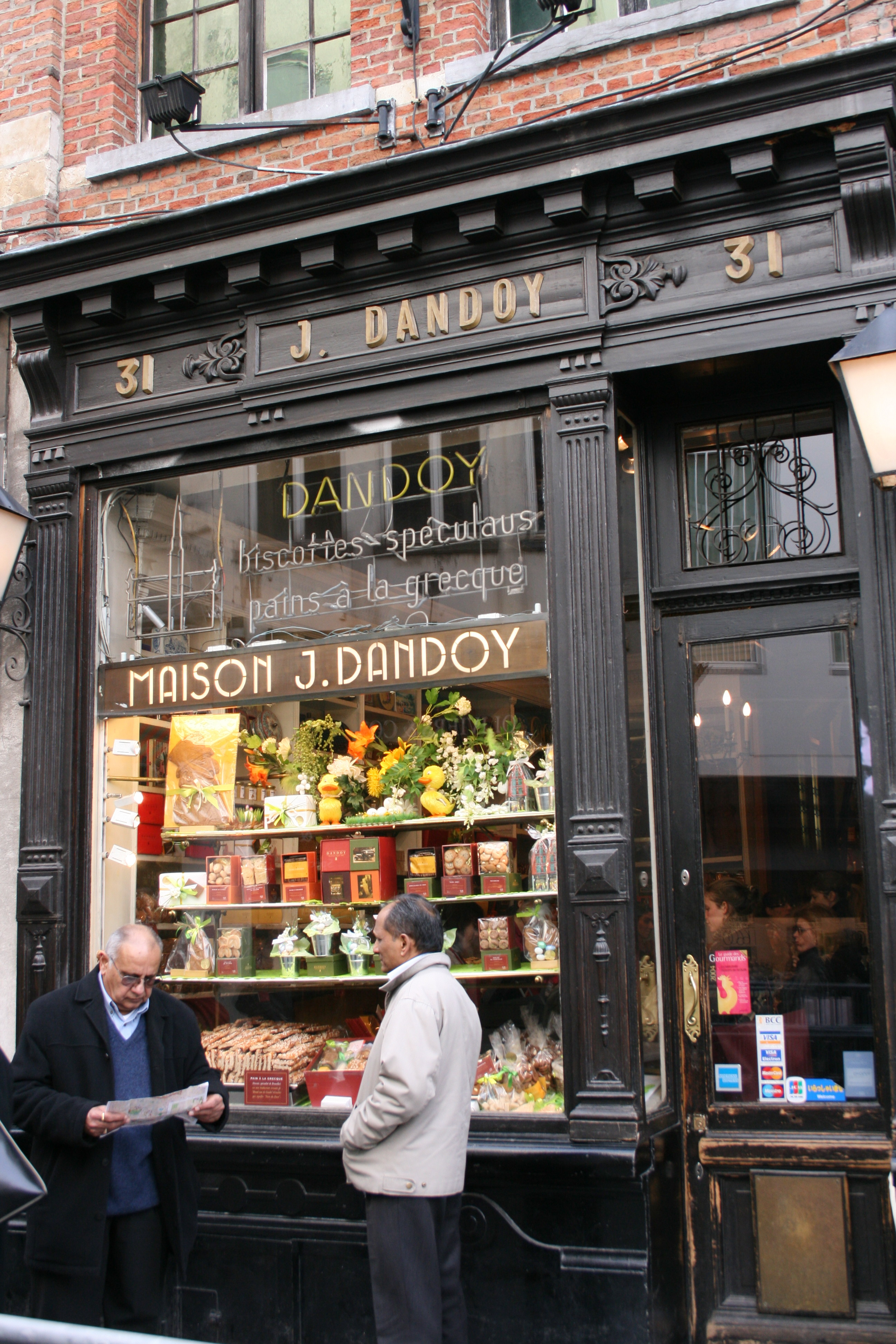 Magasin Dandoy, rue au Beurre, Brussels